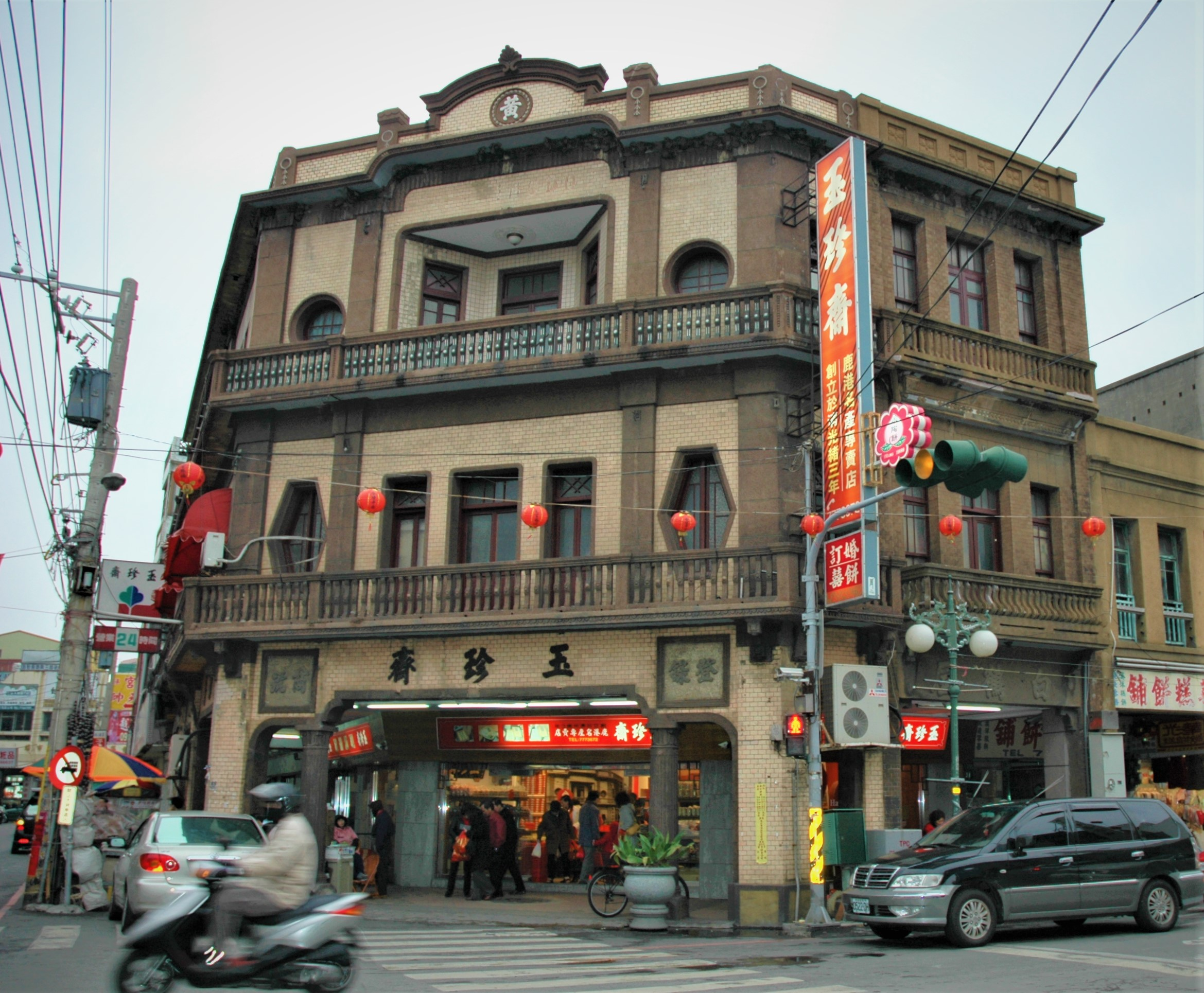 中文（台灣）: 鹿港老街09